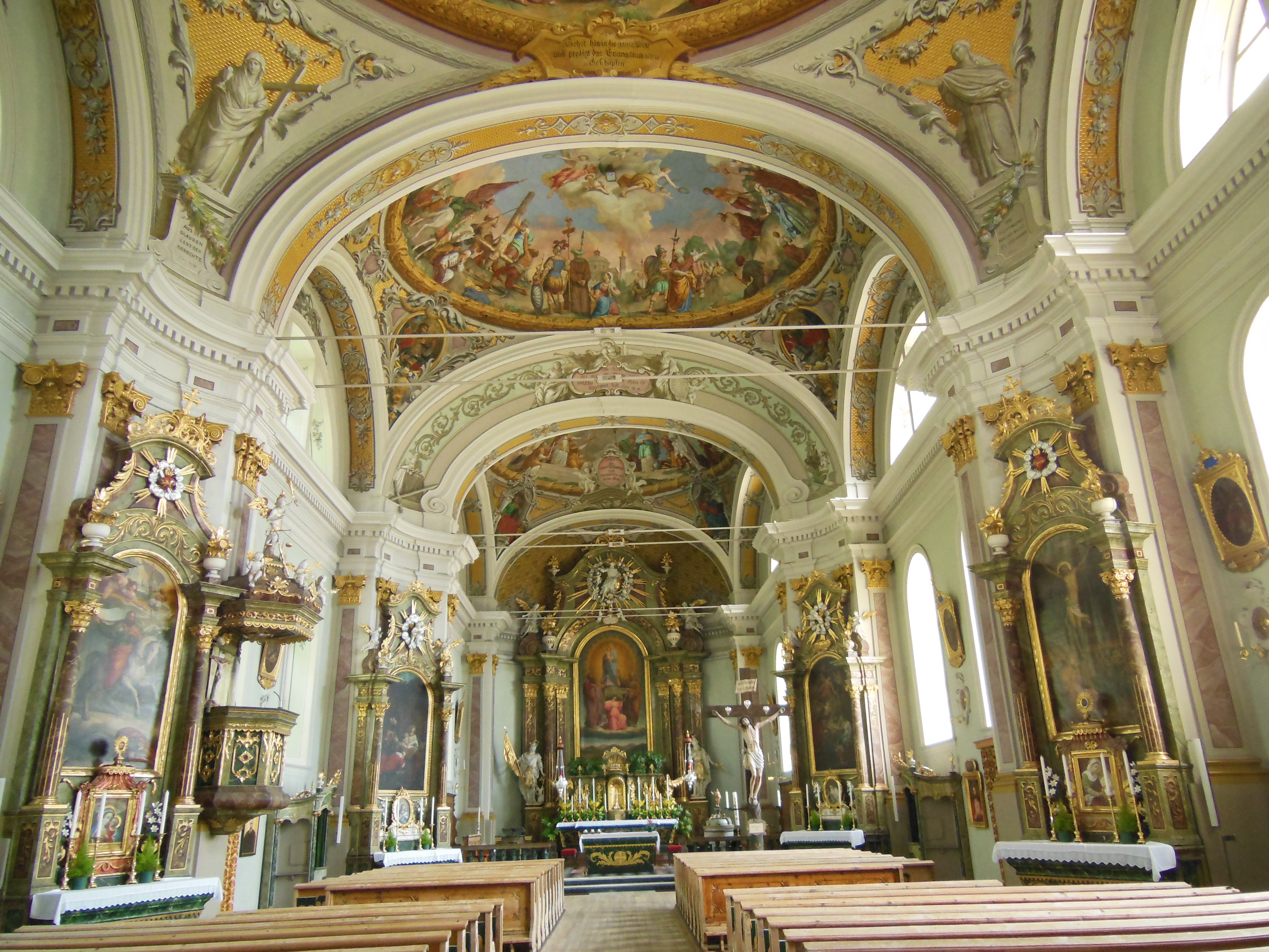 Pfarrkirche St. Peter und Paul in Kiens. Inneres mit Blickrichtung Chor